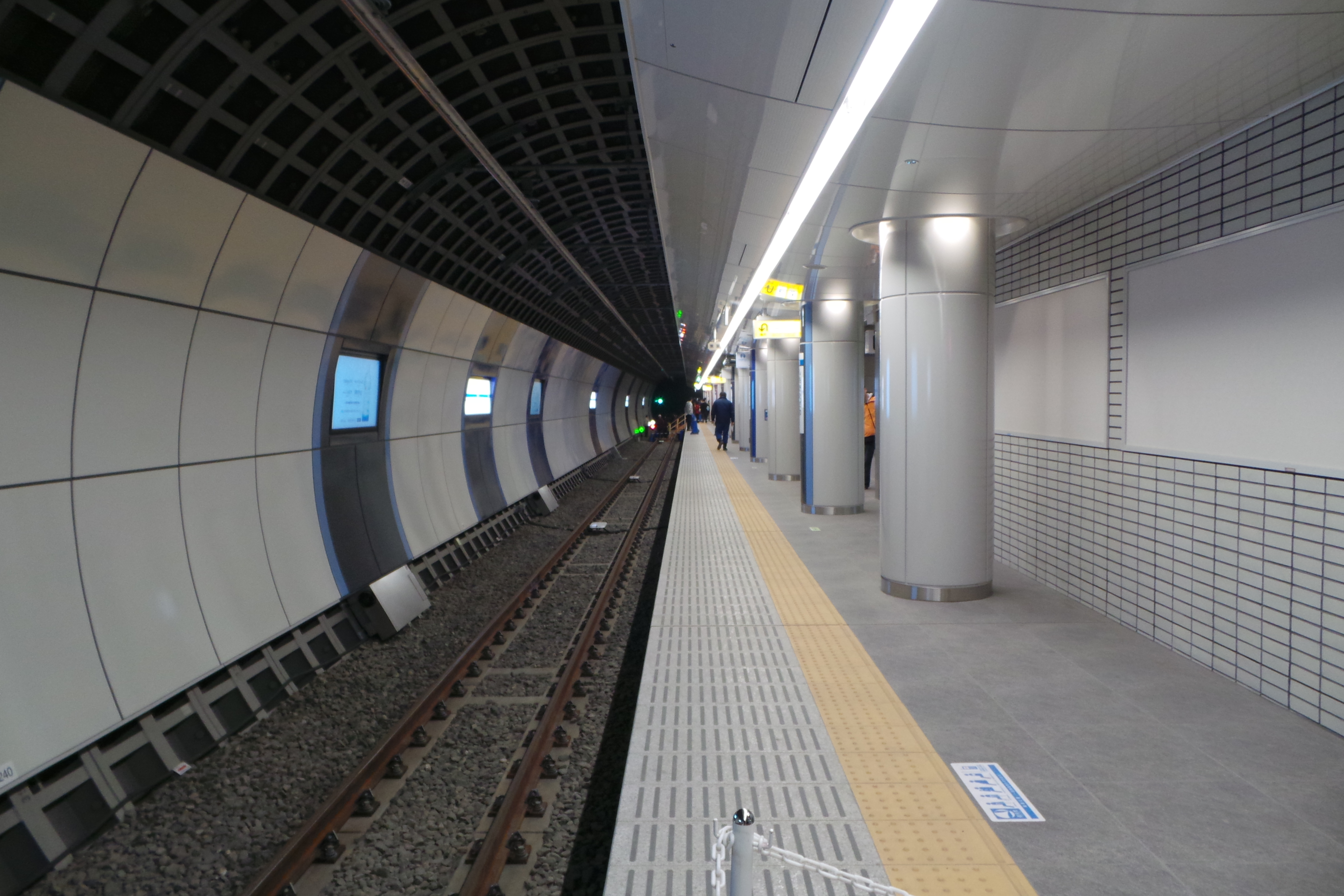 2013年3月16日小田急下北沢駅地下ホーム見学会の様子